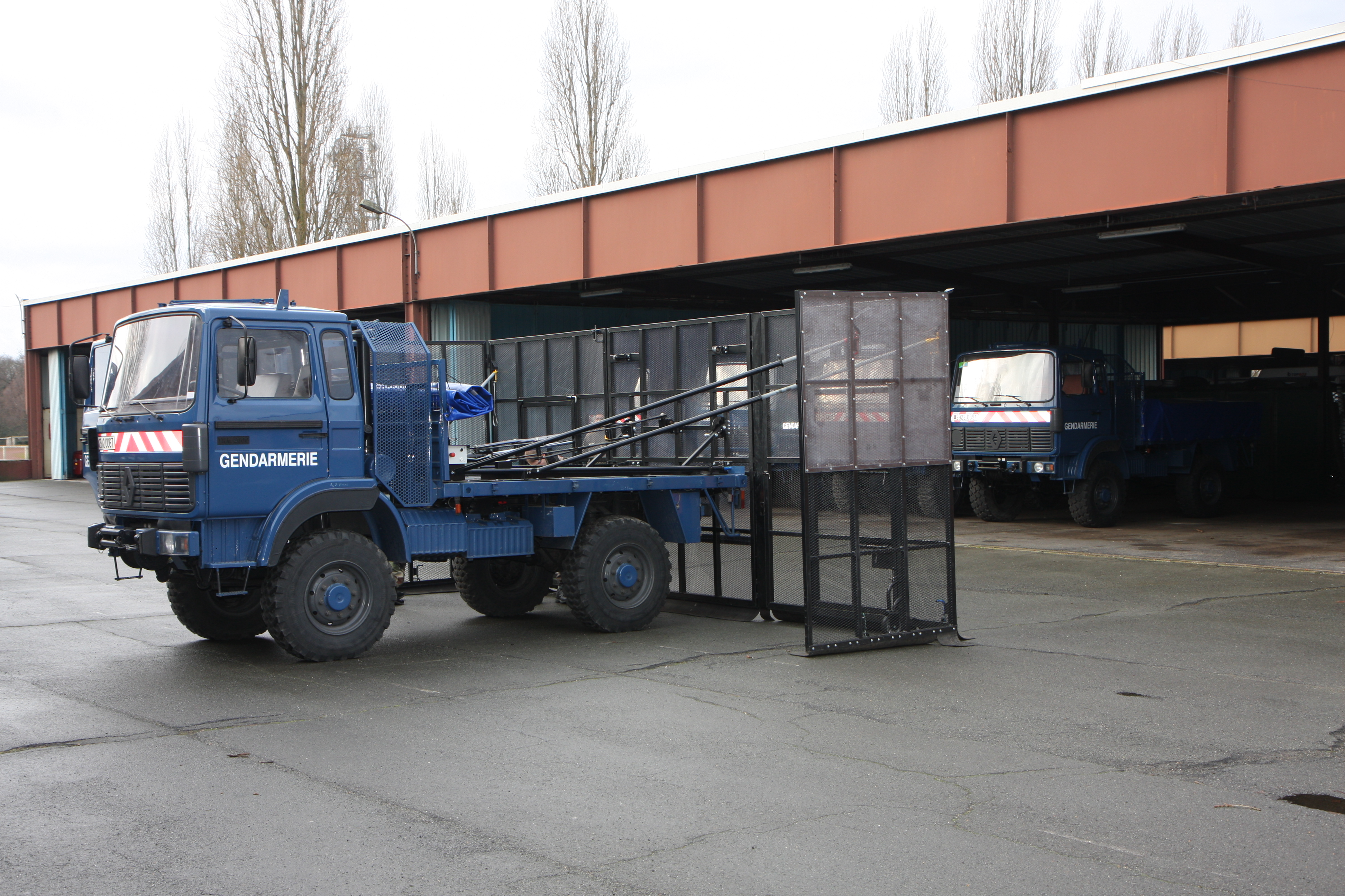 Véhicule DRAP - Satory